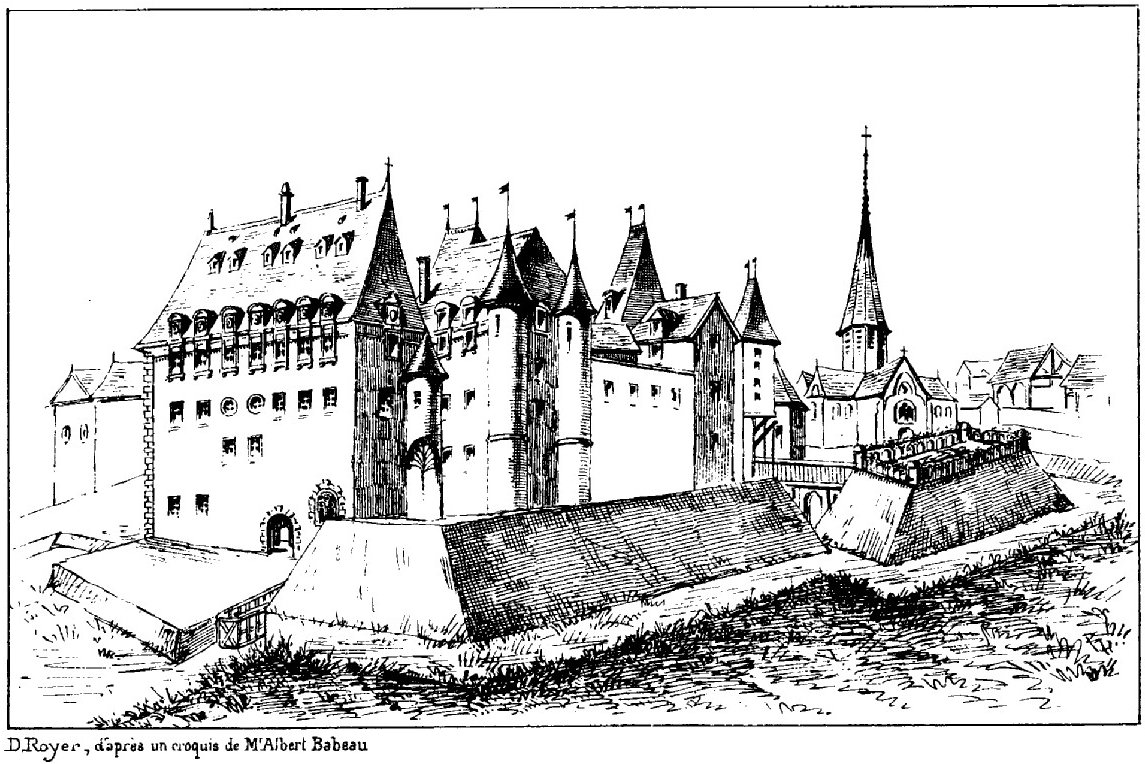 Ancien château de Pougy (Aube)